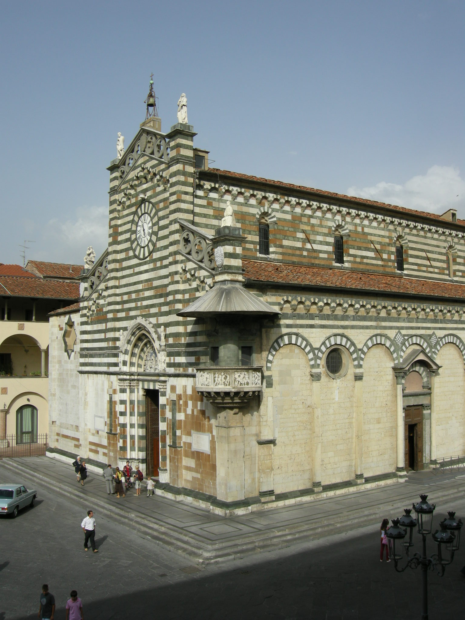 Duomo di prato, view